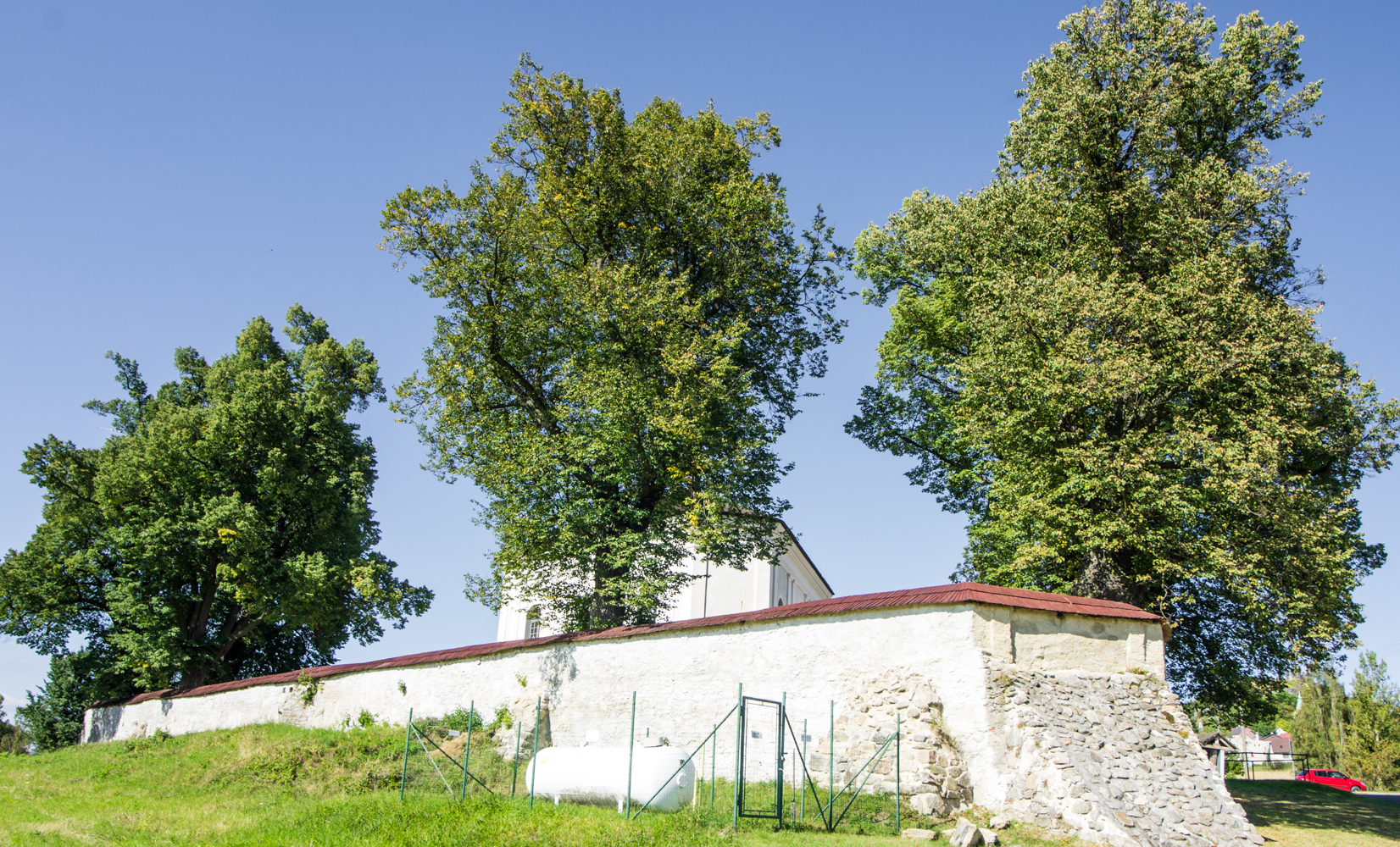 památné stromy Andělské lípy, Andělská Hora, okres Karlovy Vary